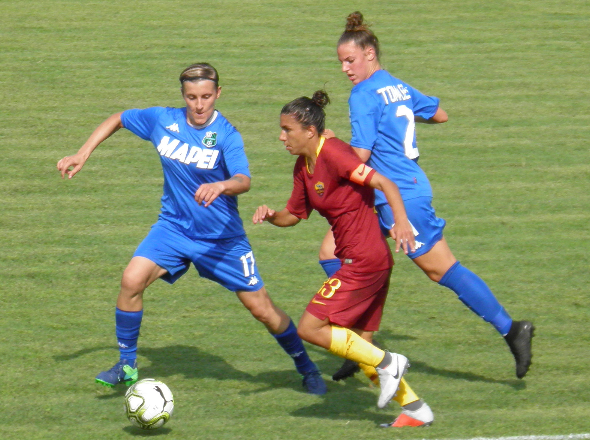 San Polo d'Enza, stadio comunale: fasi di gioco dell'incontro tra il Sassuolo e la Roma, prima giornata di Serie A di calcio femminile della stagione 2018-2019.